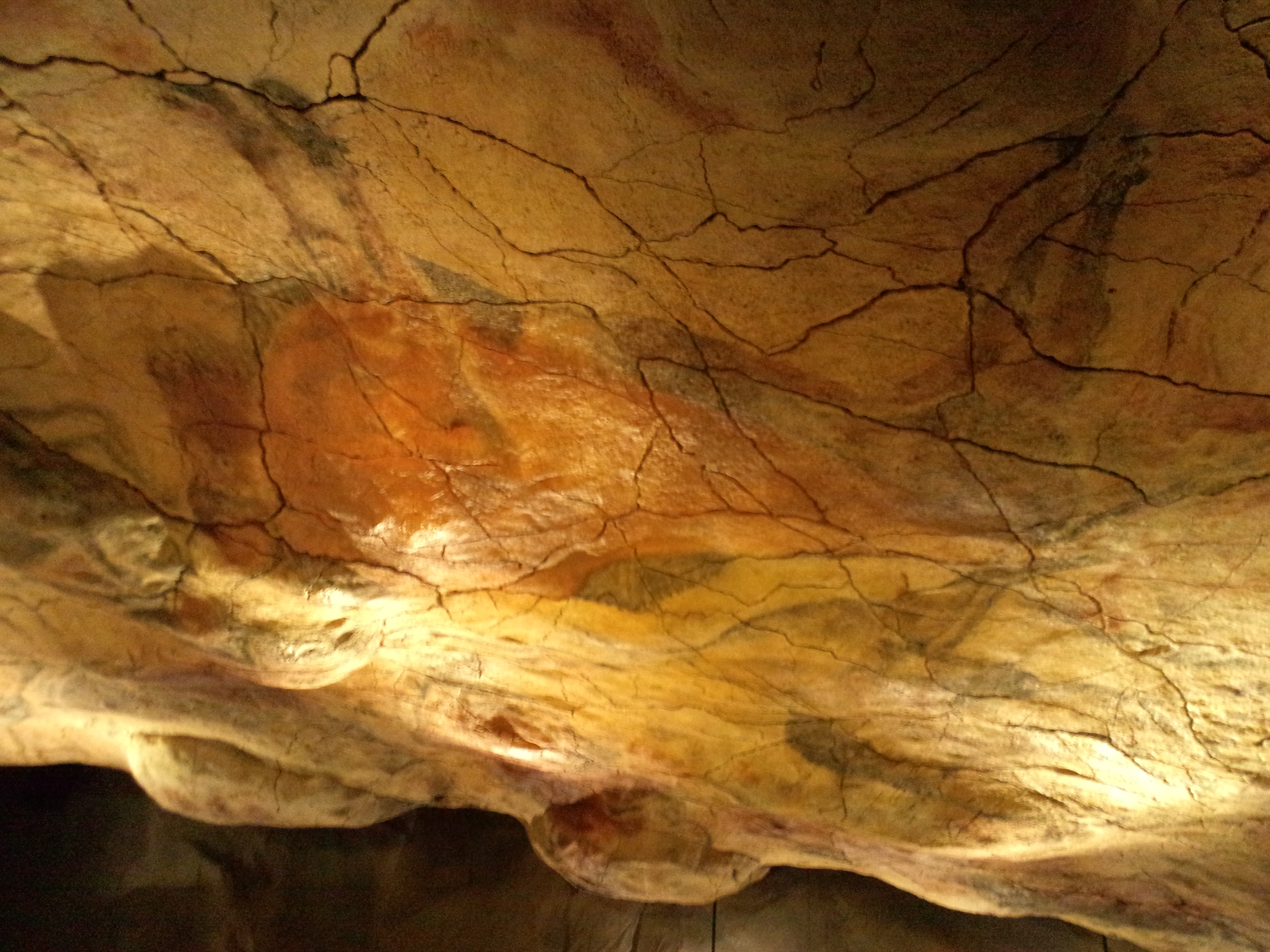 志摩スペイン村、パルケエスパーニャ ハビエル城博物館 アルタミラ洞窟（複製）